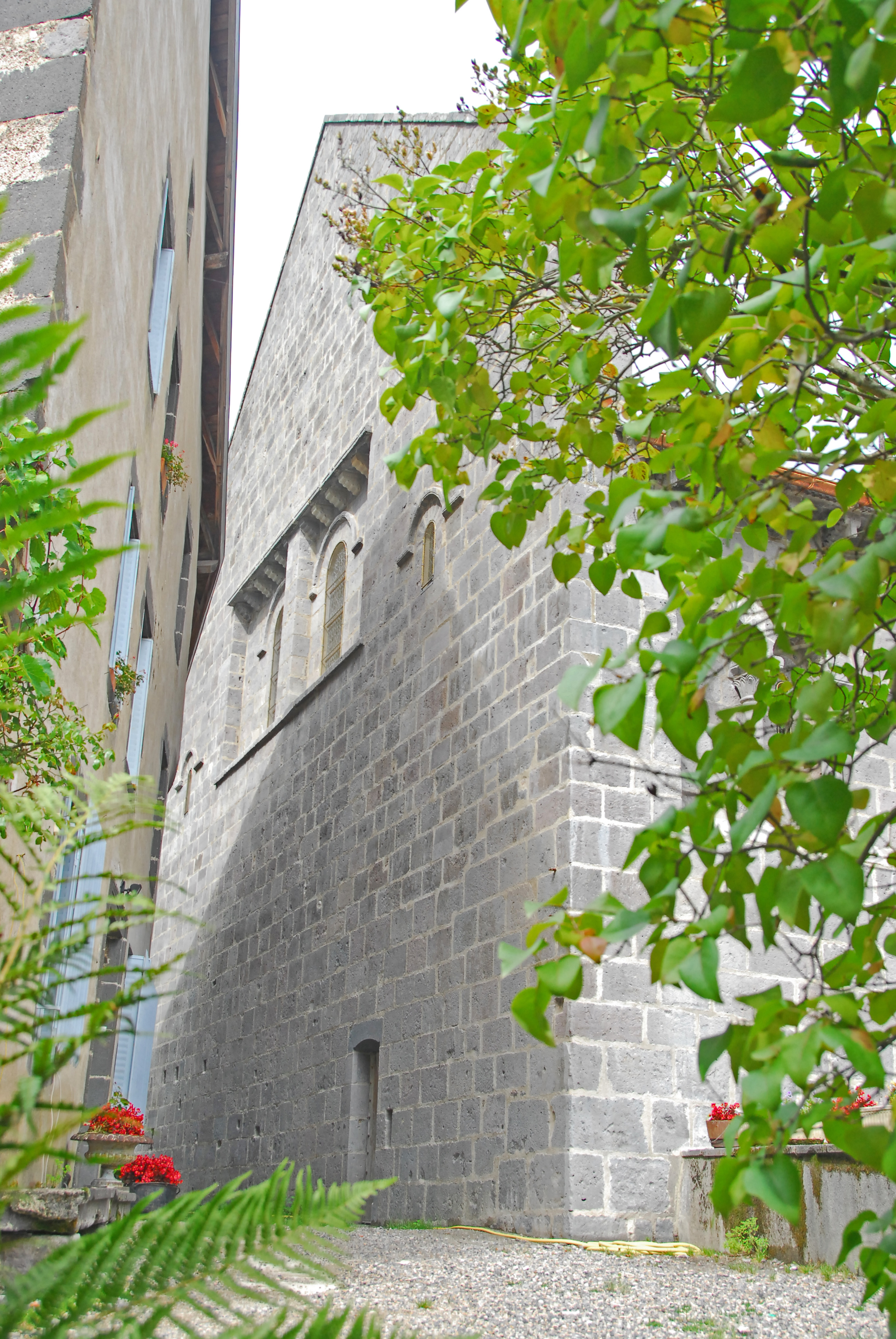 N.-D.d'Orcival, Langhaus, Westwand